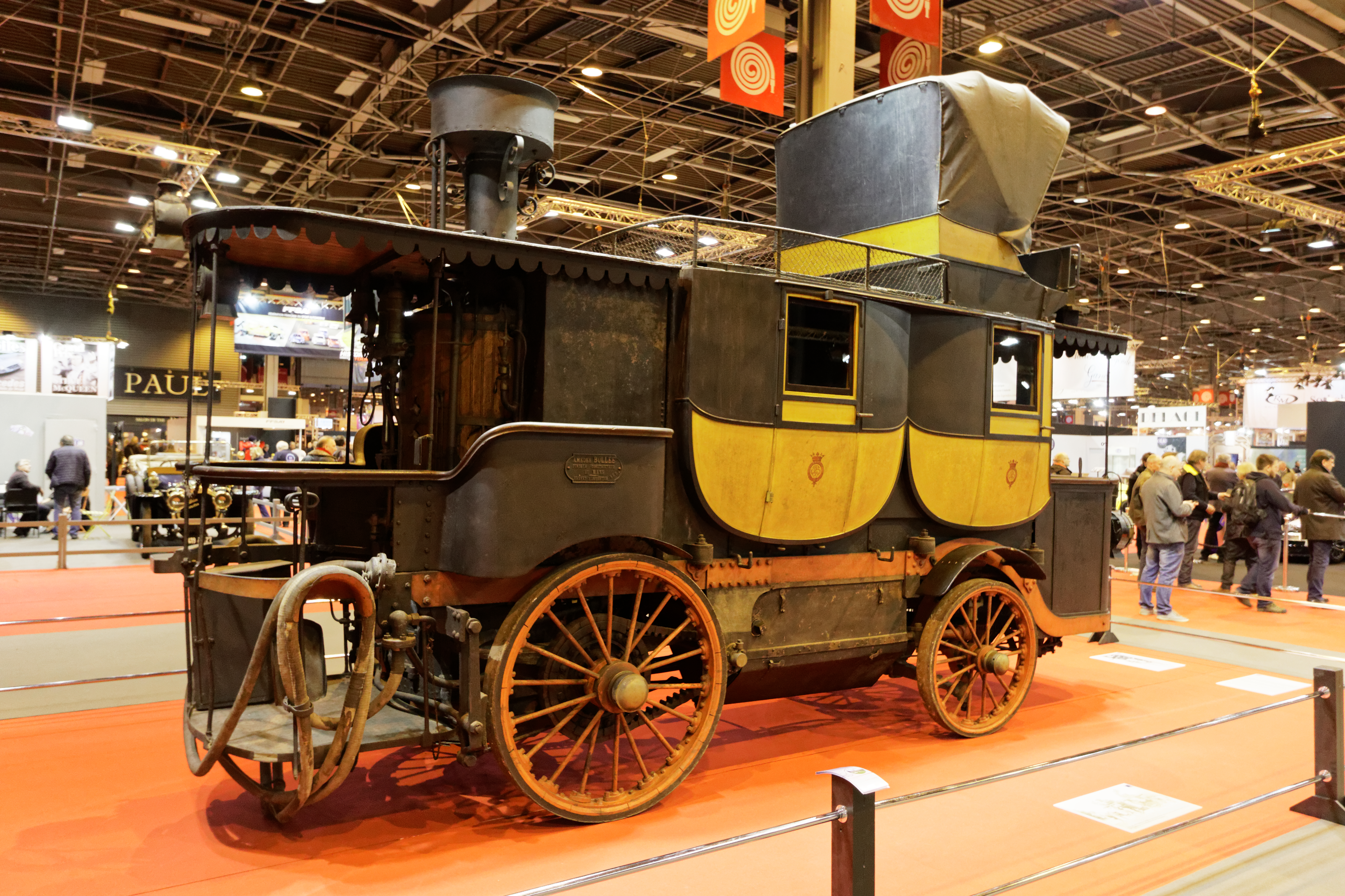 La diligence à vapeur du marquis de Broc de 1885 par Amédée Bollée père exposée lors du salon Rétromobile 2016.